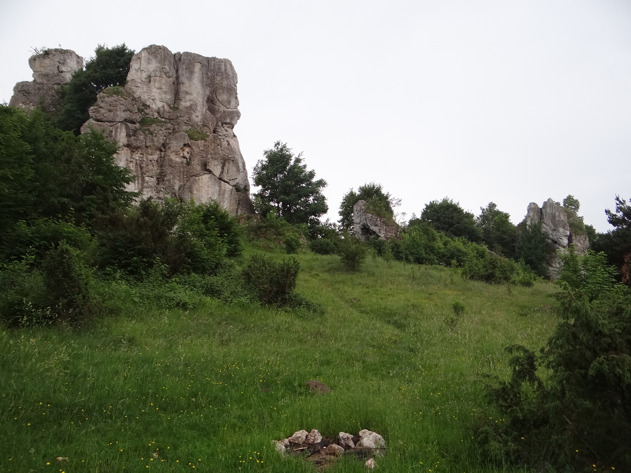 Skały Grupy Knura w Łutowcu